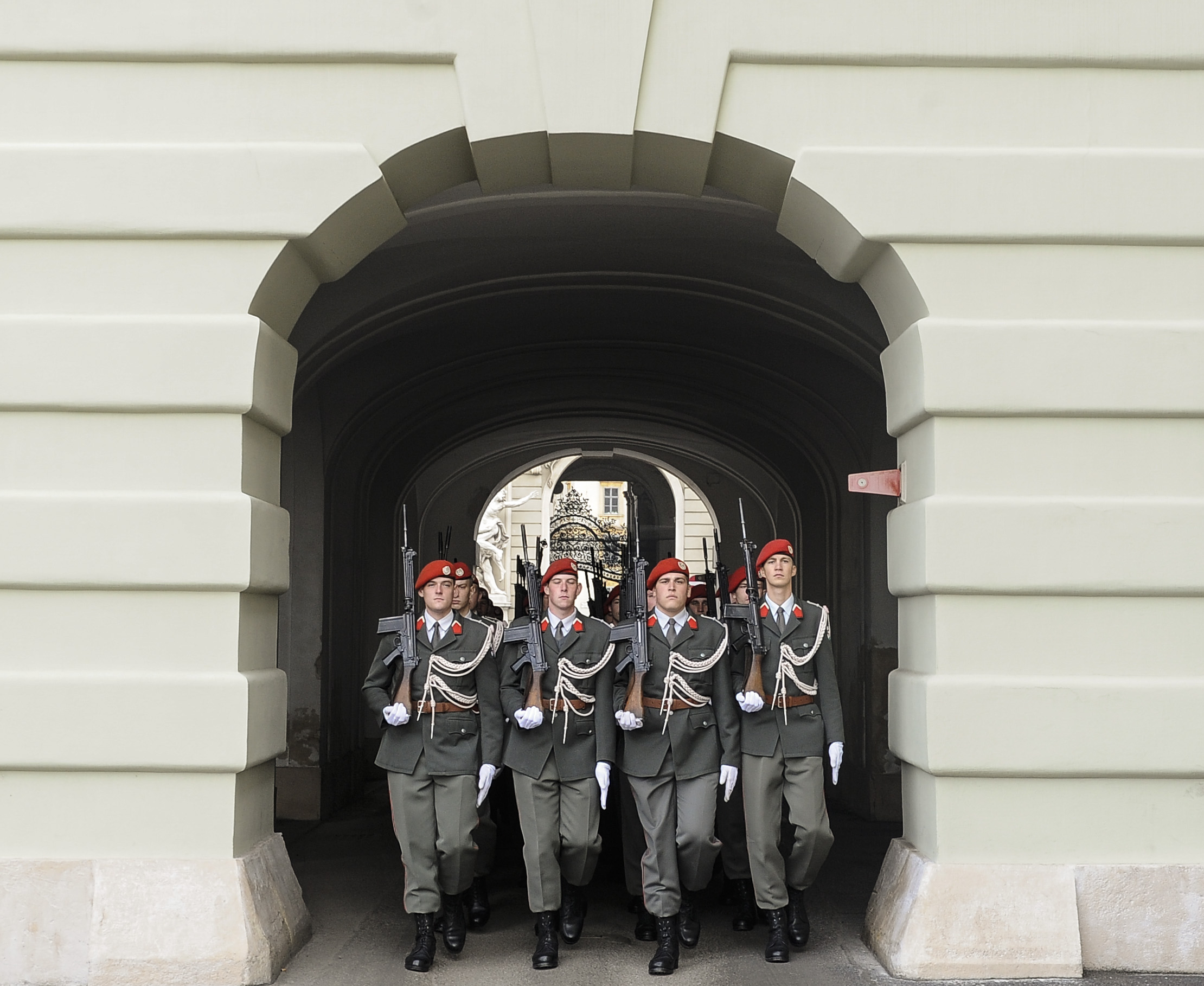 Soldaten der Garde marschieren zum Heldenplatz.